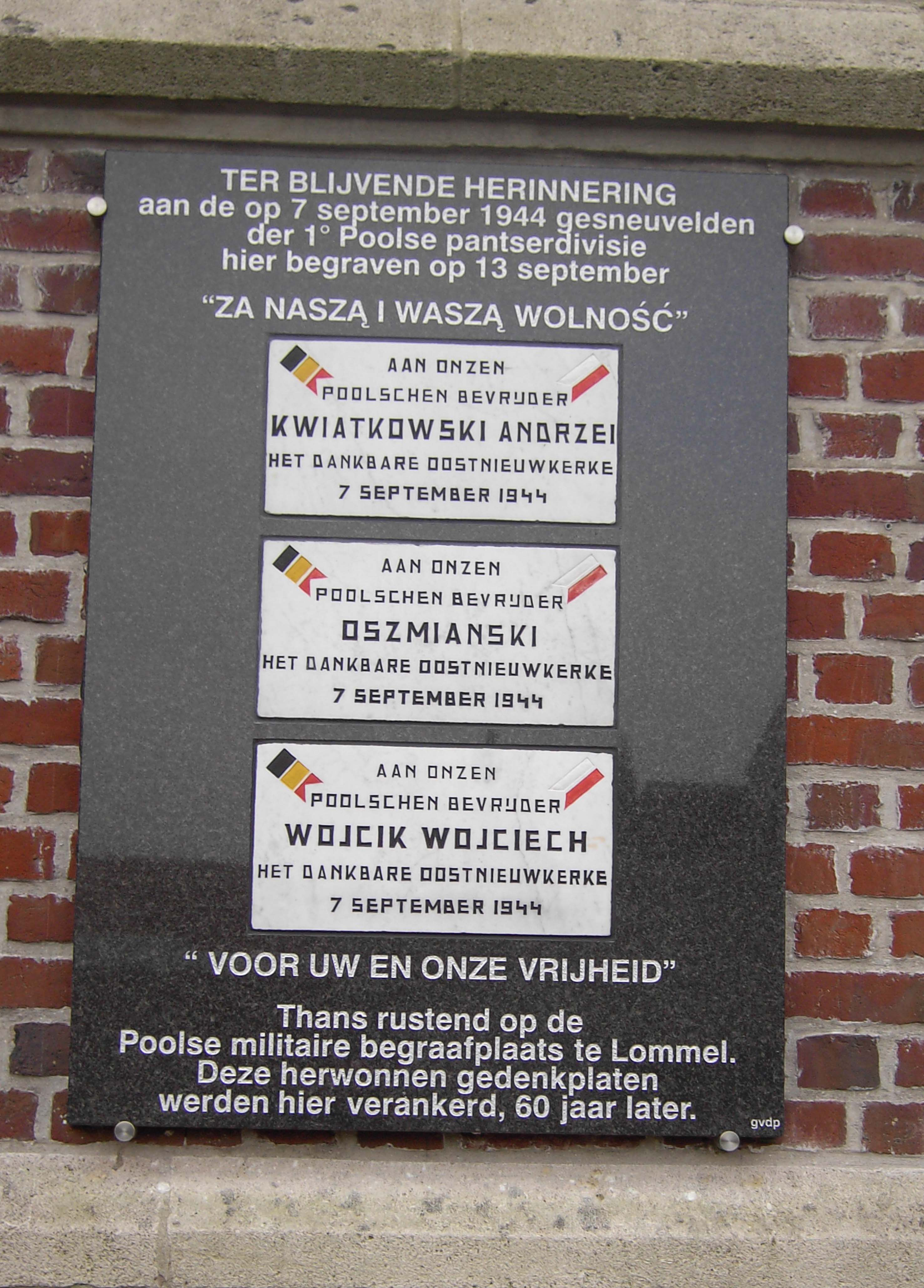 Oostnieuwkerke (Staden - Belgium) - Hulde aan de Polen